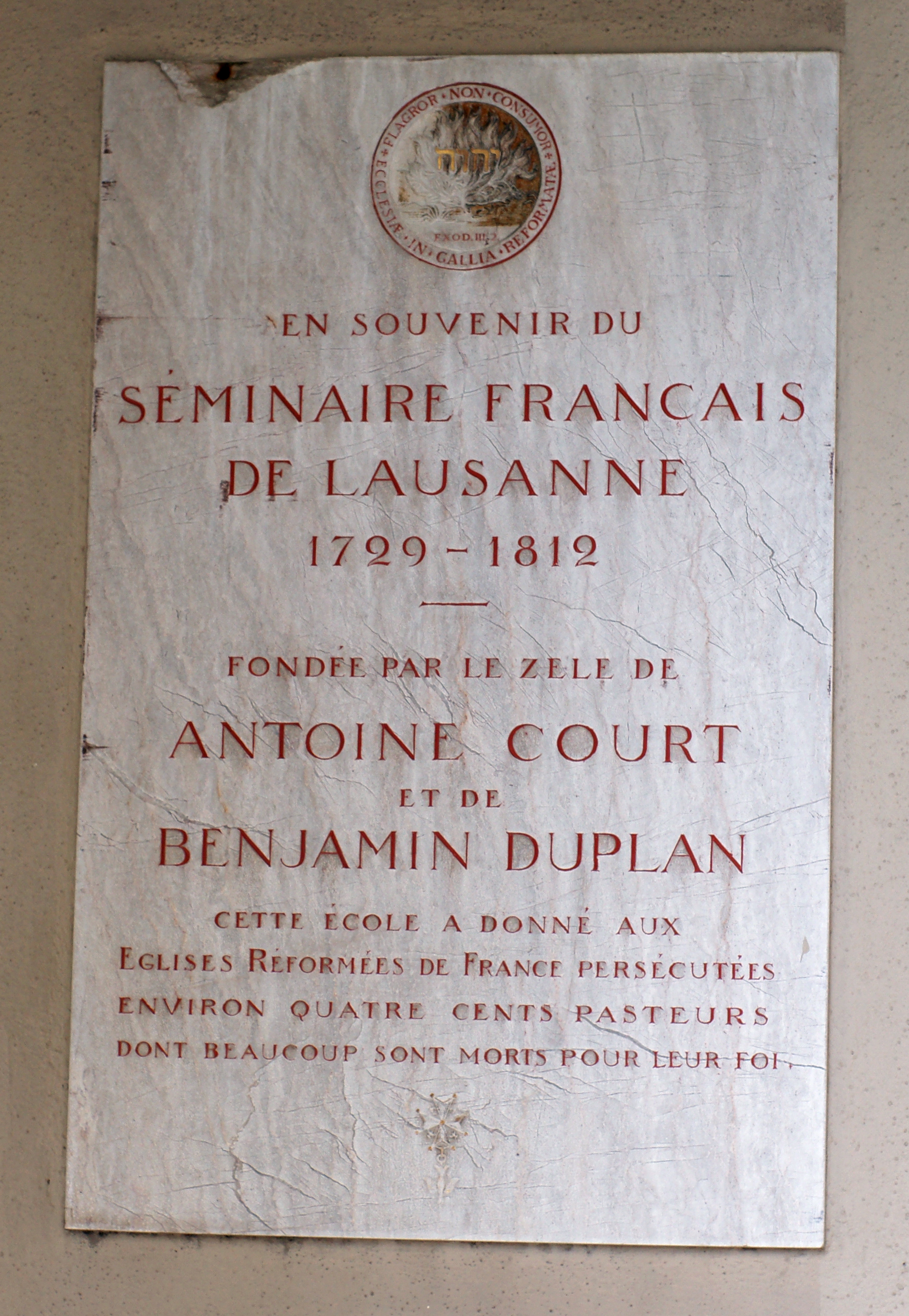 Losanna, Svizzera